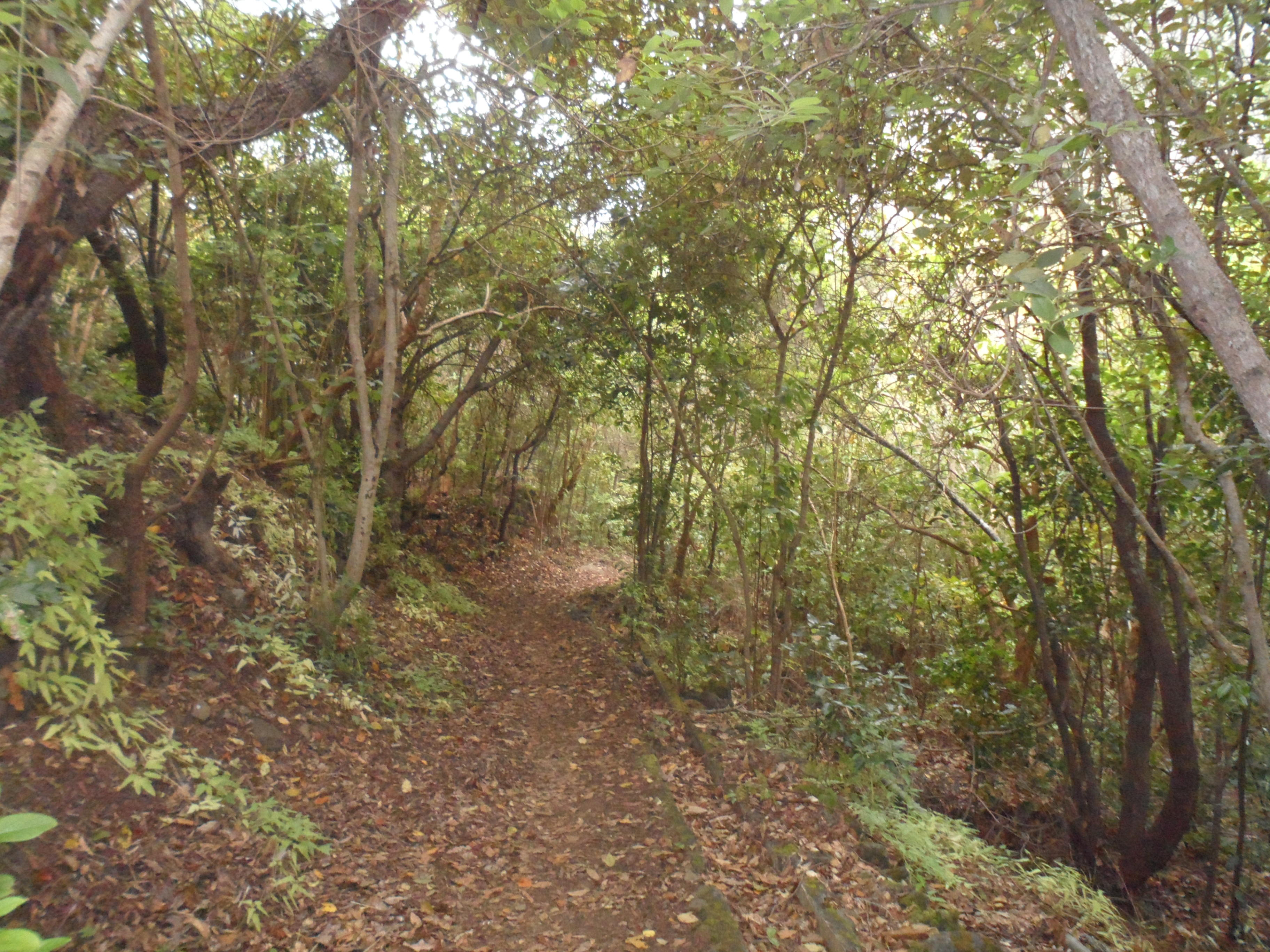 Monte del Agua 2, desde Erjos a Los Silos por camino Cuevas Negras